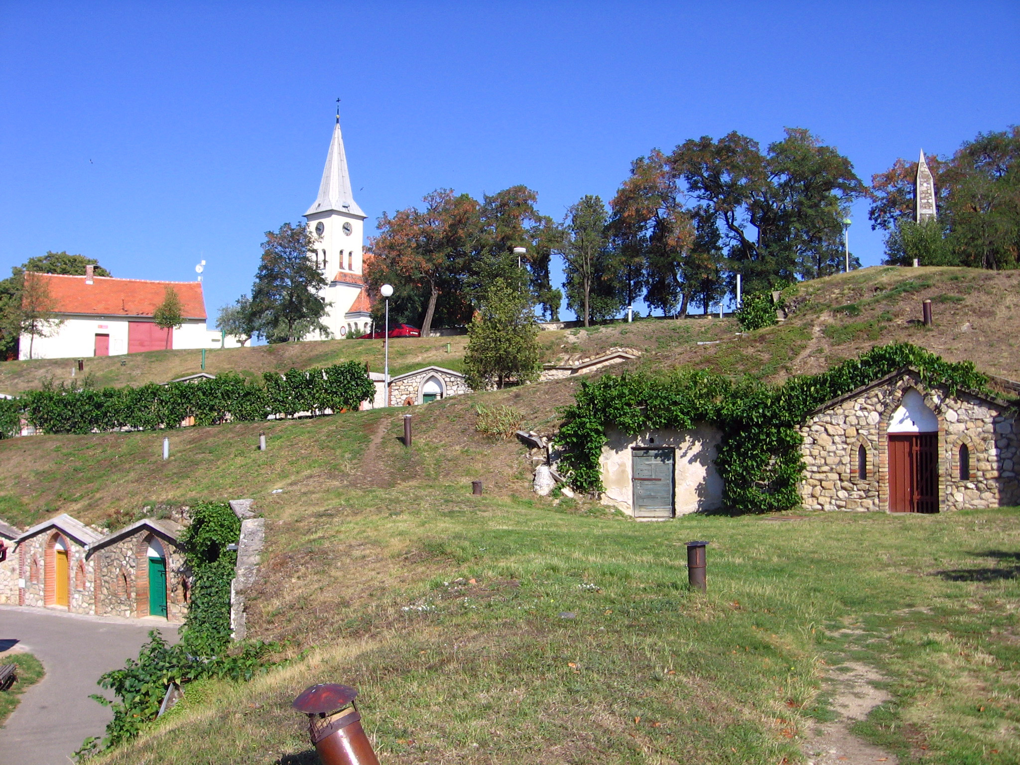 Vrbice, okres Břeclav, pohled na kostel Sv. Jiljí a vrch Na Stráži s vinnými sklepy